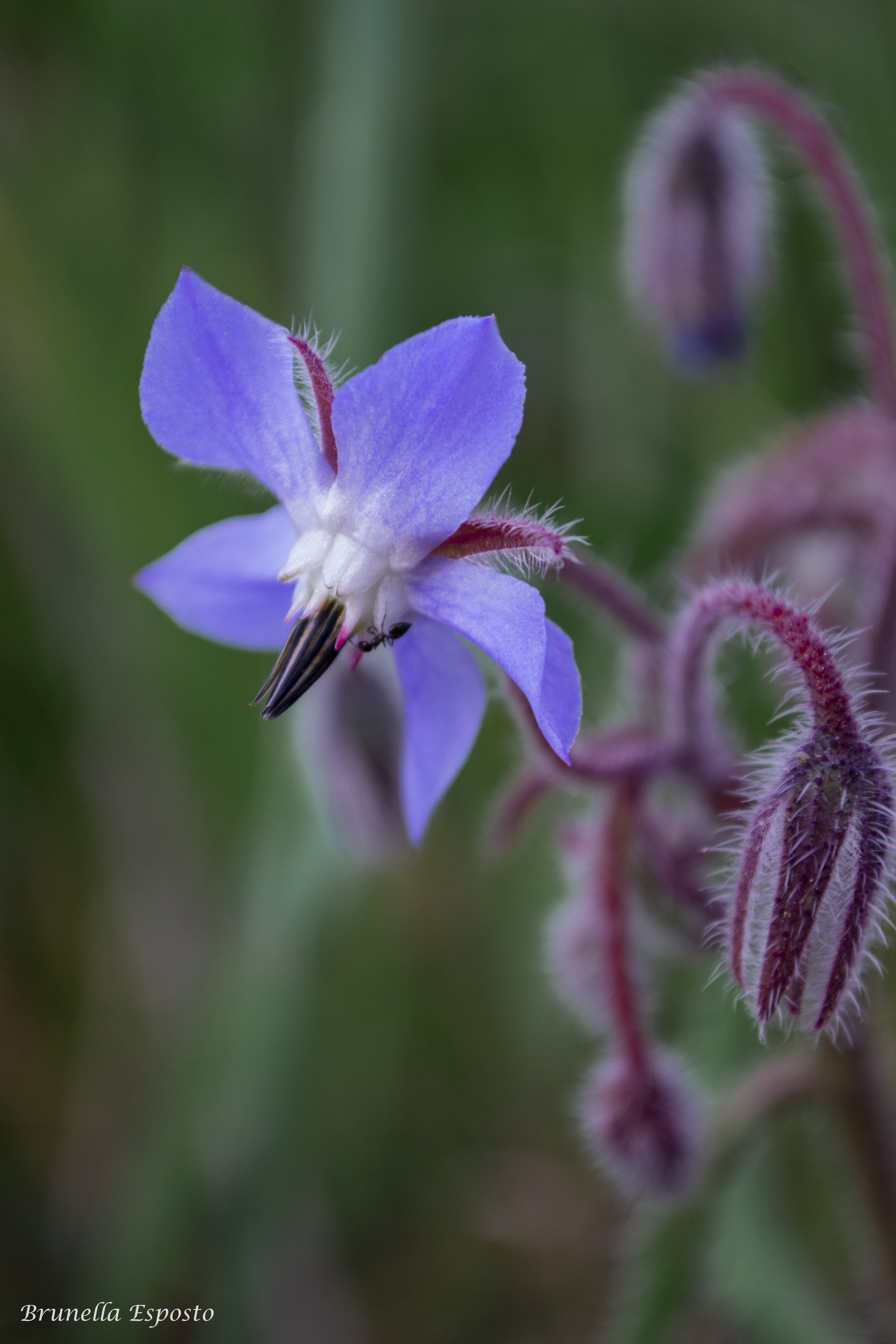 Borrago officinalis L. Scattata in un campo incolto in Basilicata, Miglionico (MT) 07/05/2020